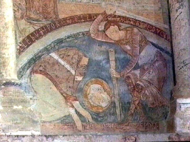 Berzé-la-Ville, Fresko in der Chapelle des Moines: Enthauptung des hl. Blasius